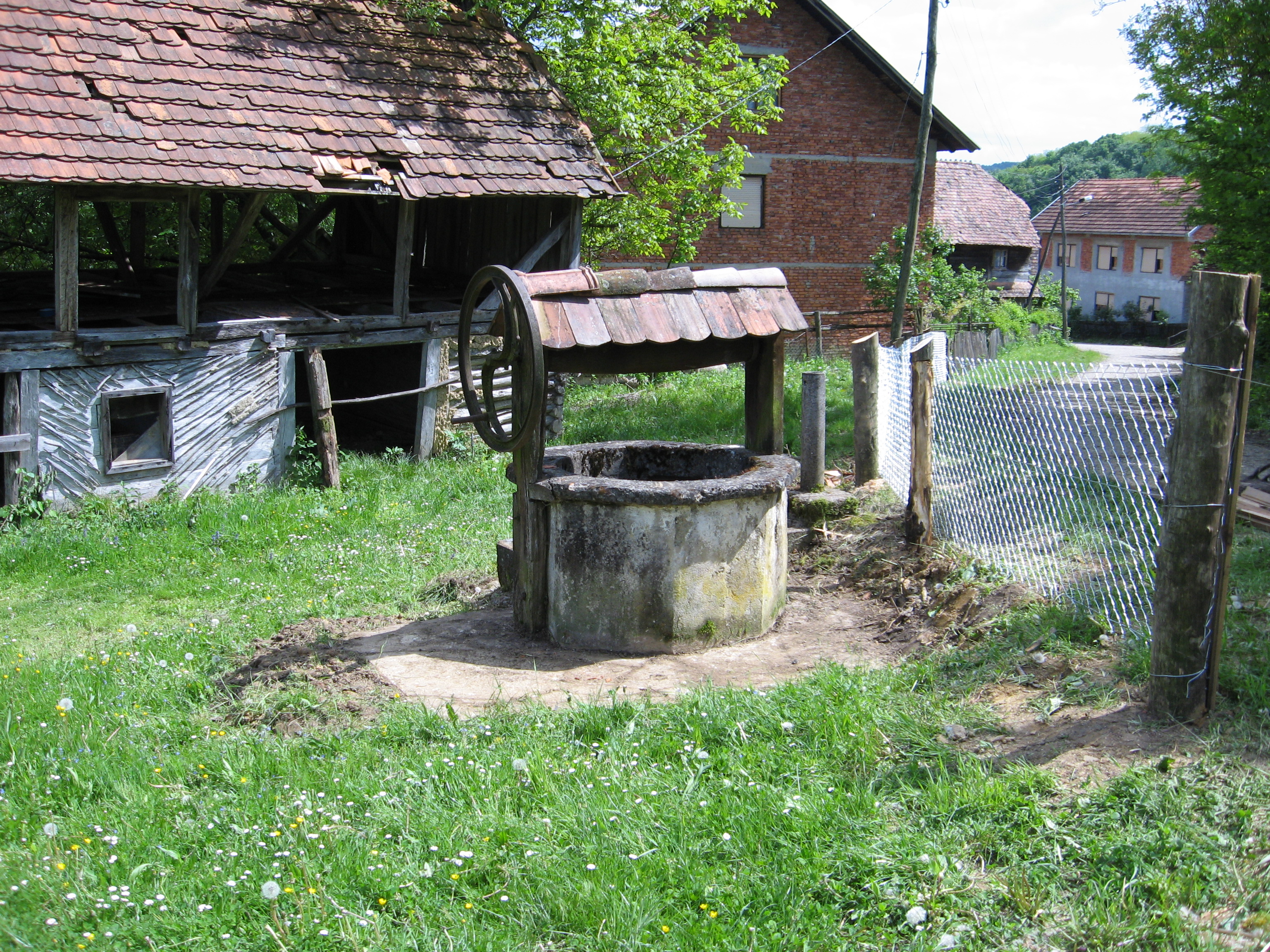 Gornja Velešnja - čatrnja Knežević